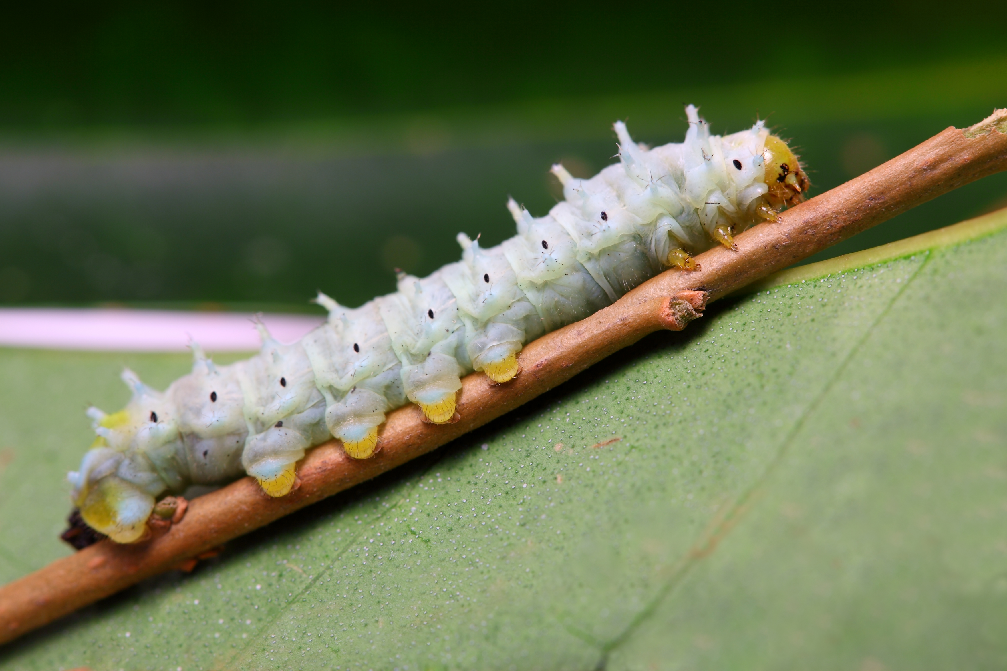 Samia ricini caterpillar